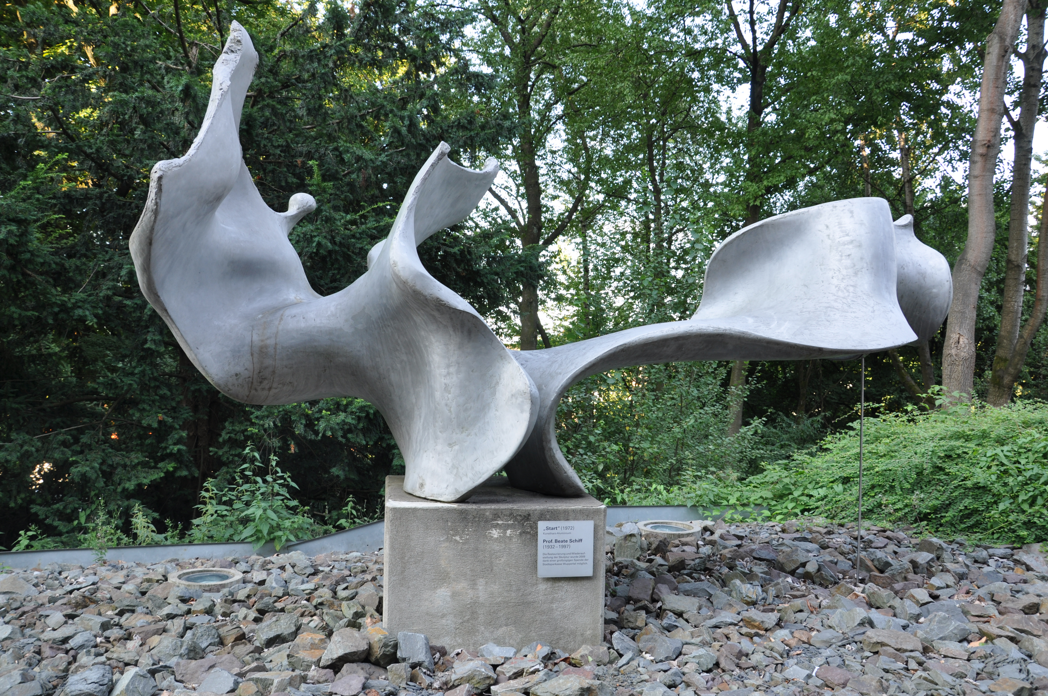 Gaußstraße, Wuppertal, Bergische Universität Wuppertal, Campus Grifflenberg